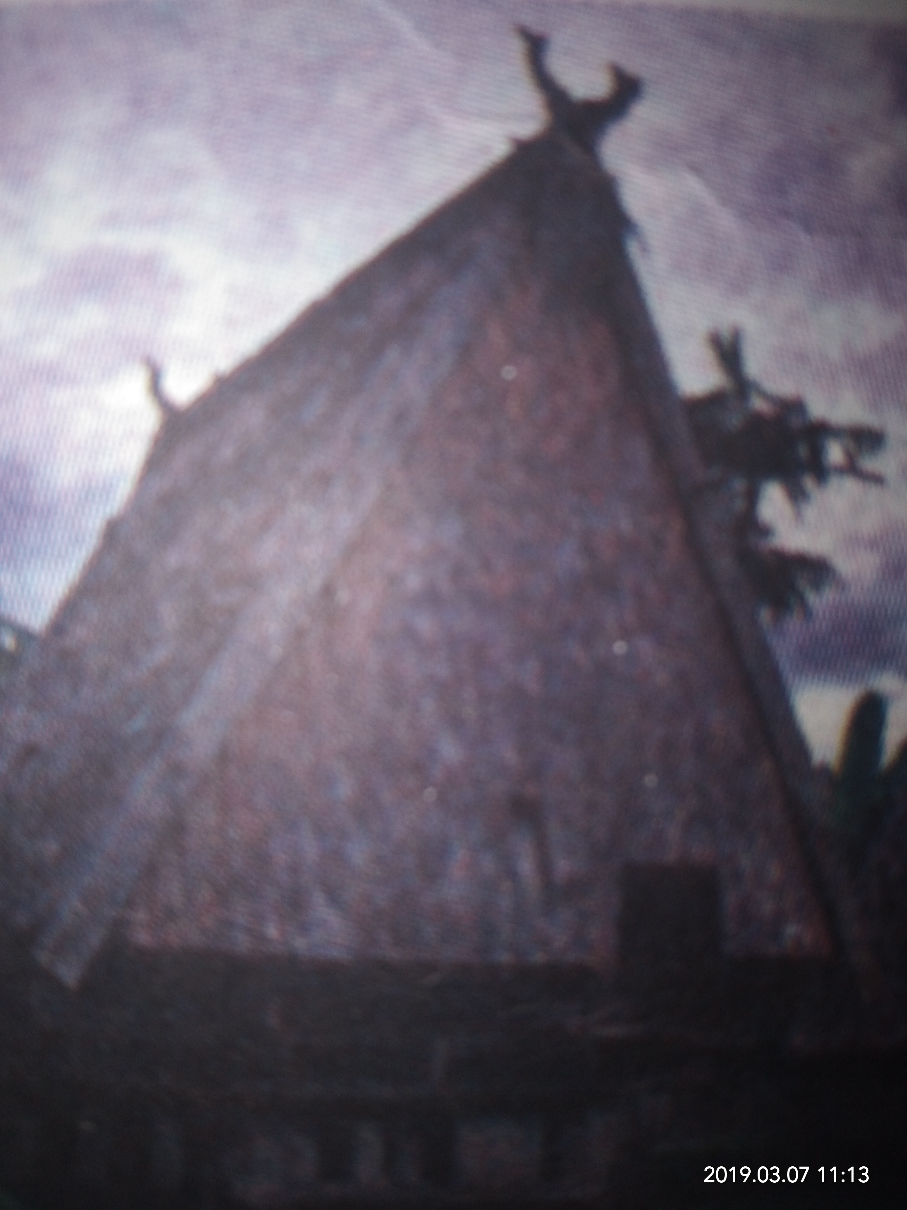 Untuk tugas sekolah